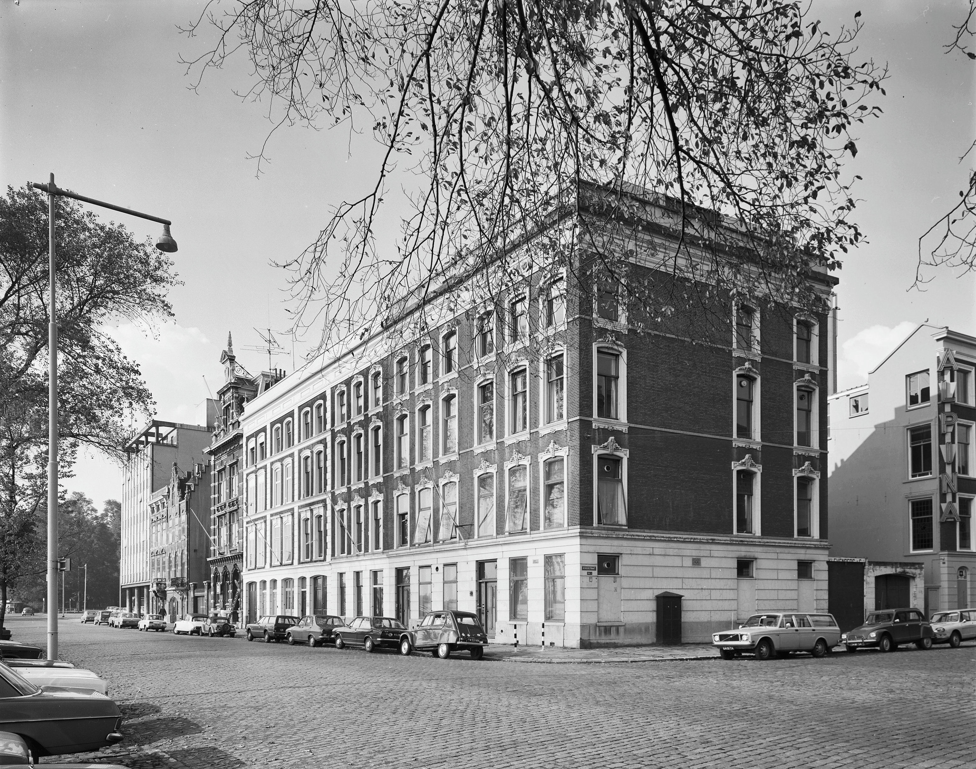 voorgevels